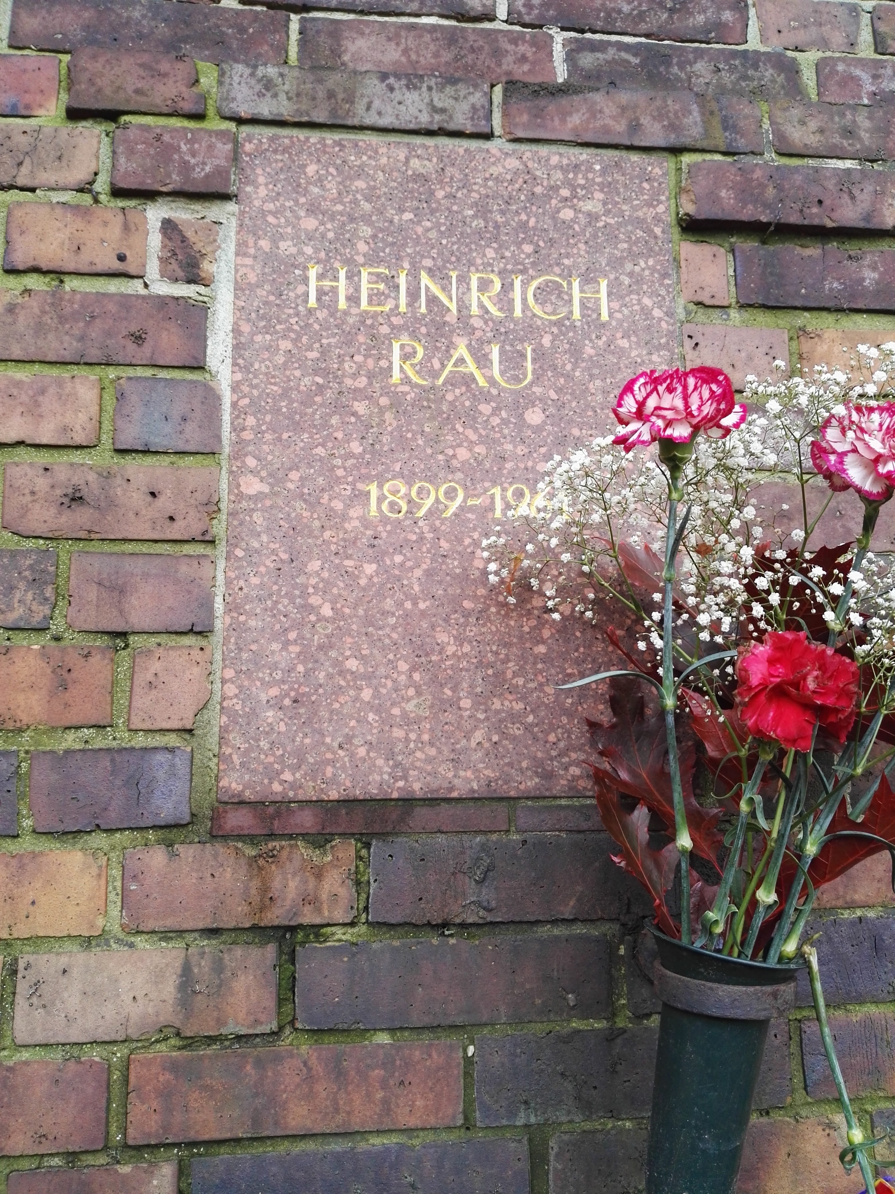 Grab von Heinrich Rau in der Gedenkstätte der Sozialisten auf dem Zentralfriedhof Friedrichsfelde in Berlin-Lichtenberg